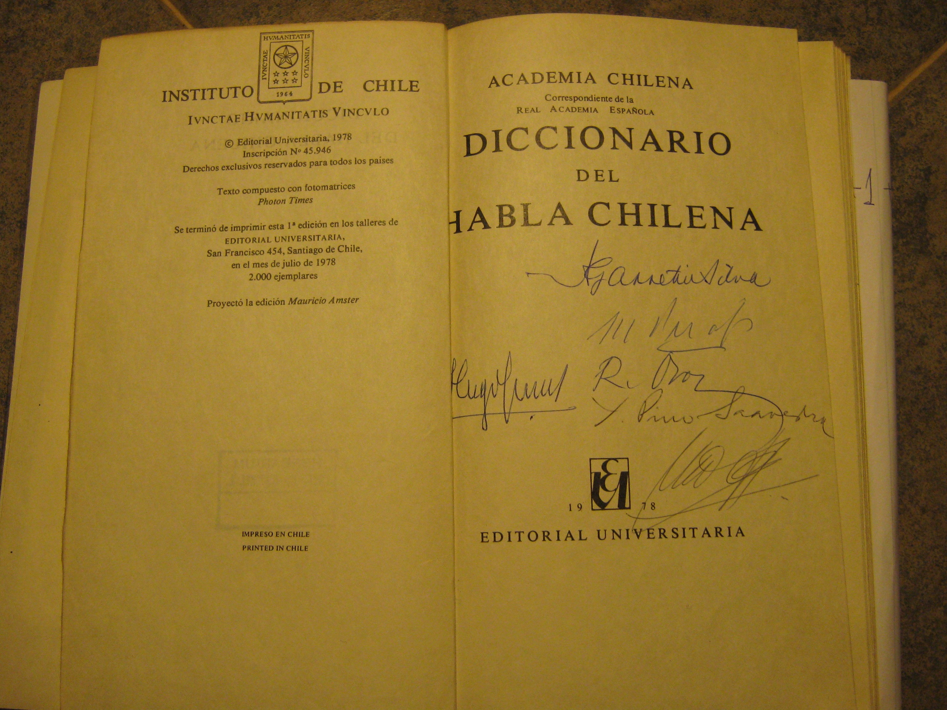 portadilla Diccionario del Habla chilena Editorial Universitaria. Ejemplar de trabajo con los autografos de la comisión de lexicografía: R. Oroz, P. Lira, Y. Pino, A.Garretón, E.Pereira, J.Vergara, D.Barros, A.Matus y H.Gunckel Inscripción Nr. 45946